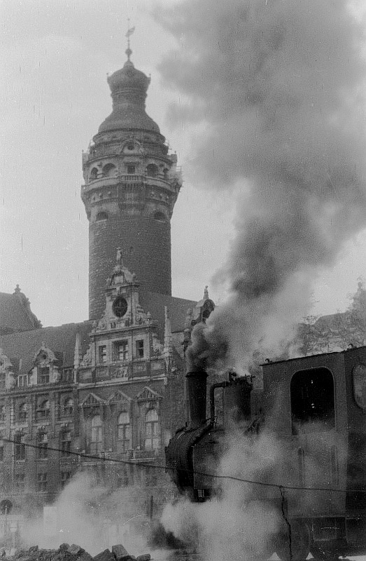 Original image description from the Deutsche Fotothek Trümmerbahn vor dem Neuen Rathaus